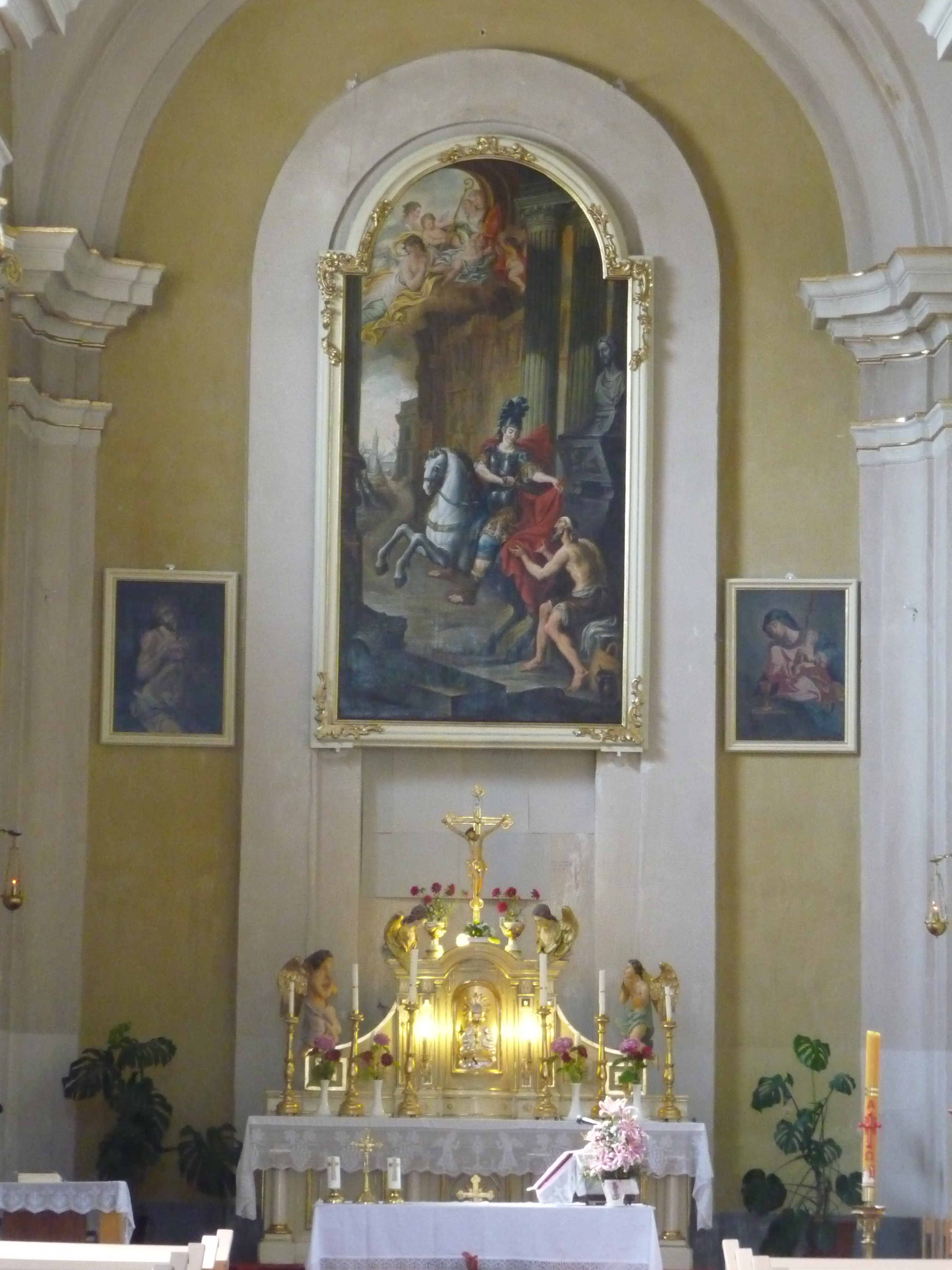 A főoltár a három oltárképpel a bujáki római katolikus templomban